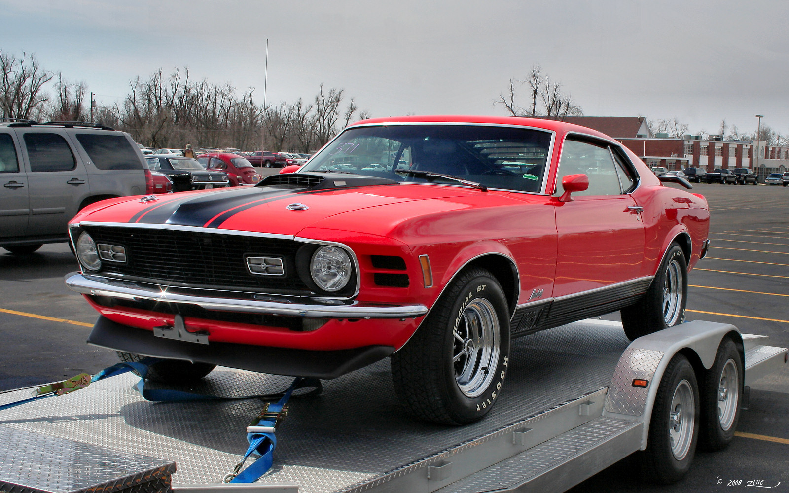 '57 Heaven Museum & Branson/Springfield, MO, March 20, 2008